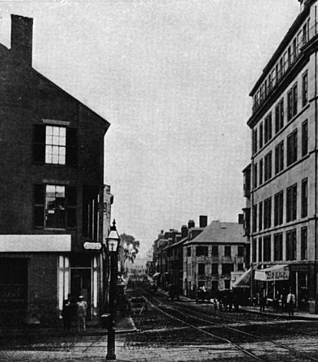 Boston, Massachusetts